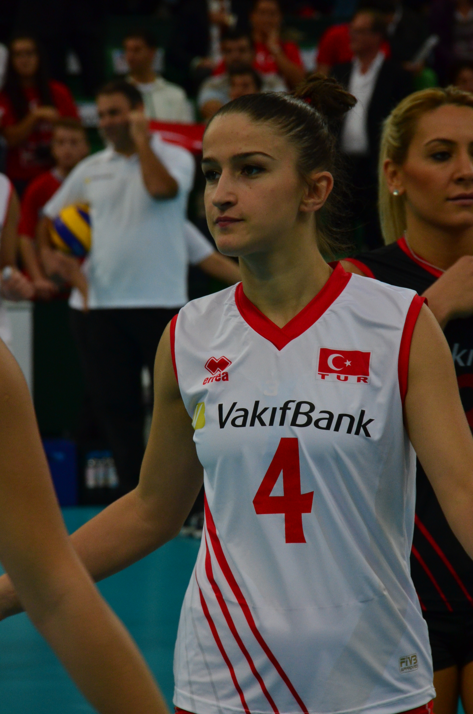 Volleyball-Europameisterschaft der Frauen 2013-Spielort Halle (Westf) Gerry-Weber-Stadion - Spiel 8. September 2013 (Deutschland-Türkei)